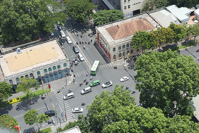 Tòa nhà kiến trúc Pháp ngã 3 đường Lê Duẫn, Đinh Tiên Hoàng